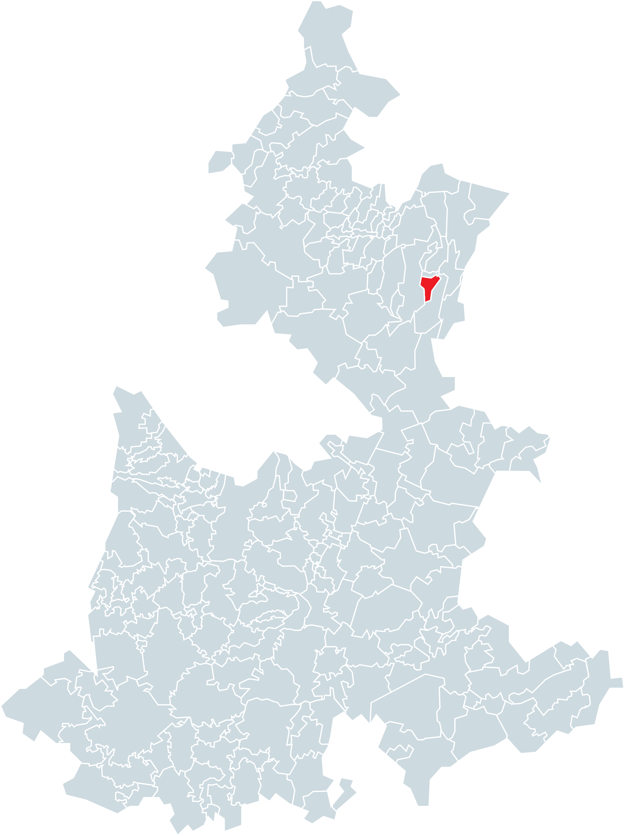 Municipio de Atempan